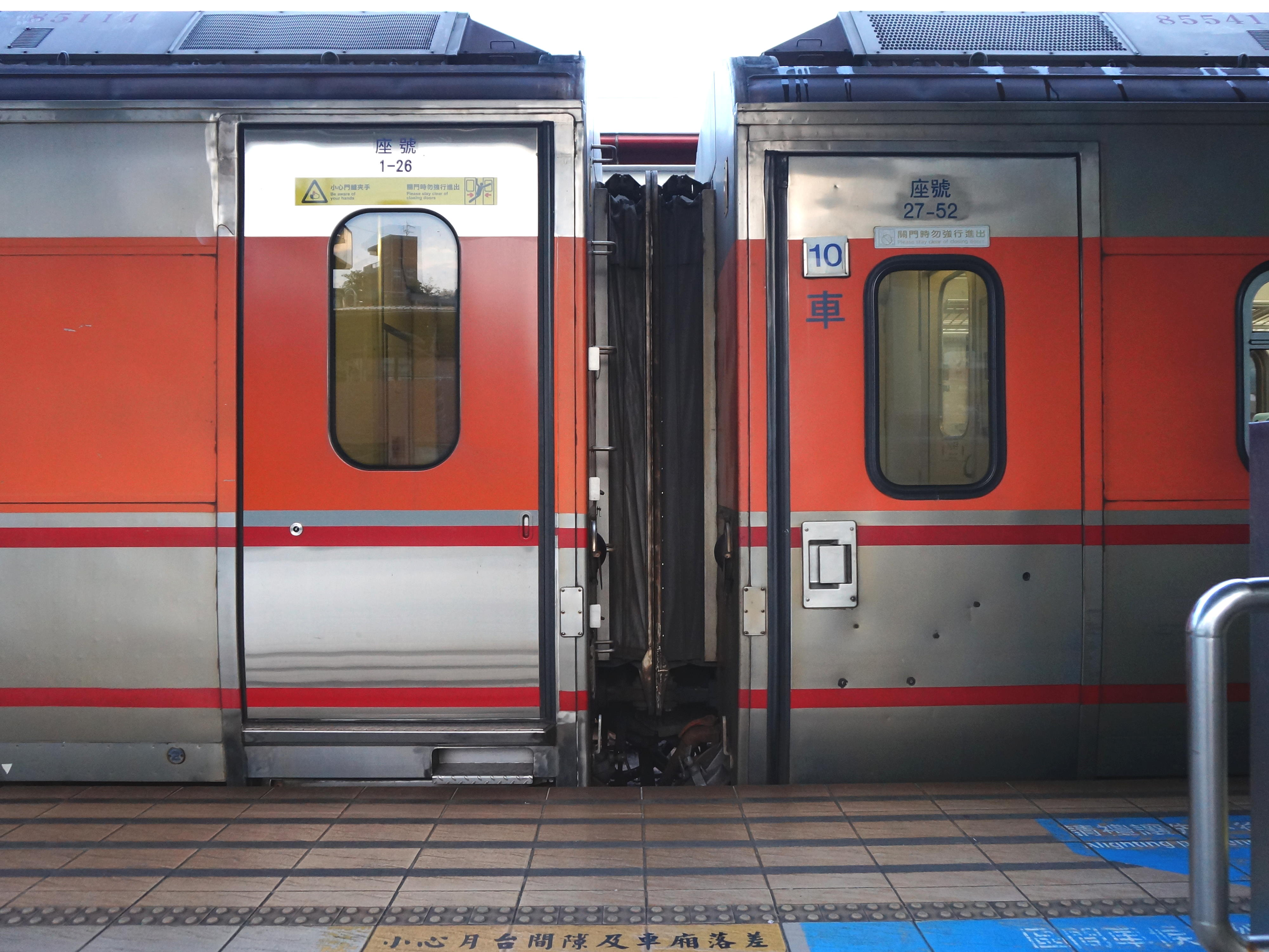 臺灣鐵路管理局汐止車站第二月台A側，推拉式自強號客車自動門關門，注意自動門高低差。